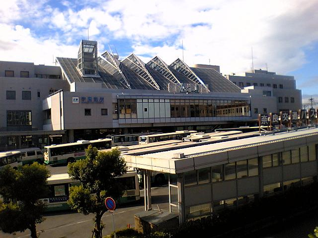 2007年9月16日 近鉄学園前駅北口。投稿者自身が撮影